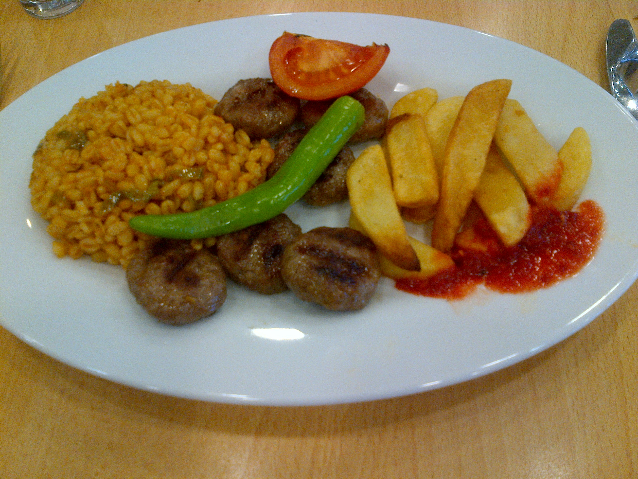 "Köfte"s turcos con patatas fritas, "pilav" de bulgur, salsa picante, un pimiento tipo piper y una tajada de tomate.